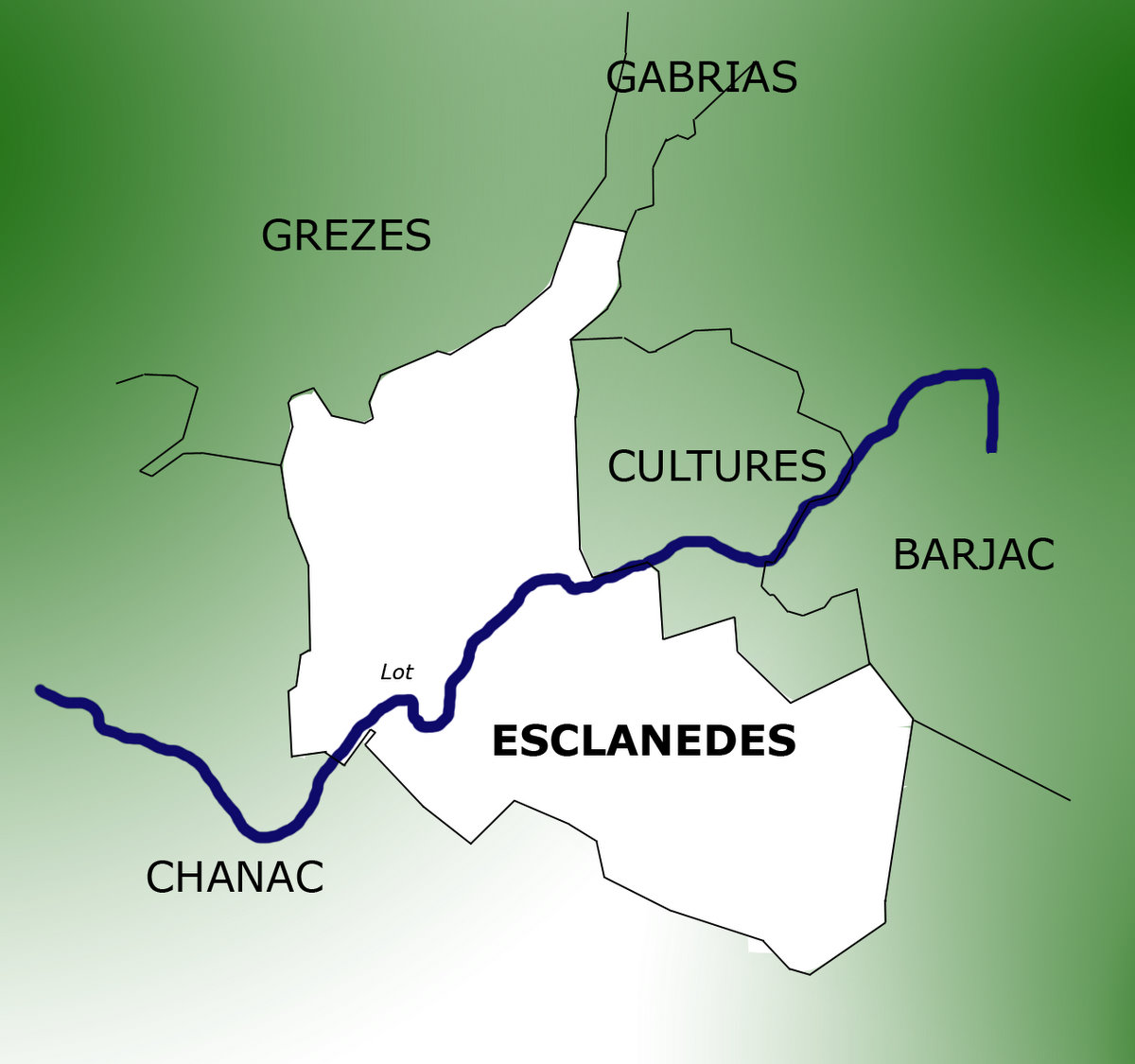 Carte des limites de la commune d'Esclanèdes